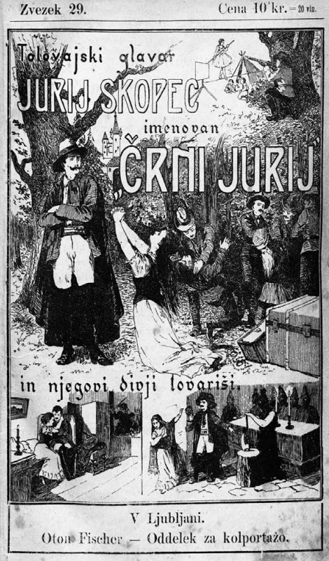 Naslovnica enega od zvezkov romana Miroslava Malovrha Tolovajski glavar Črni Jurij, 1903--1905